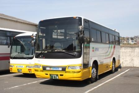 スピナの貸切車705